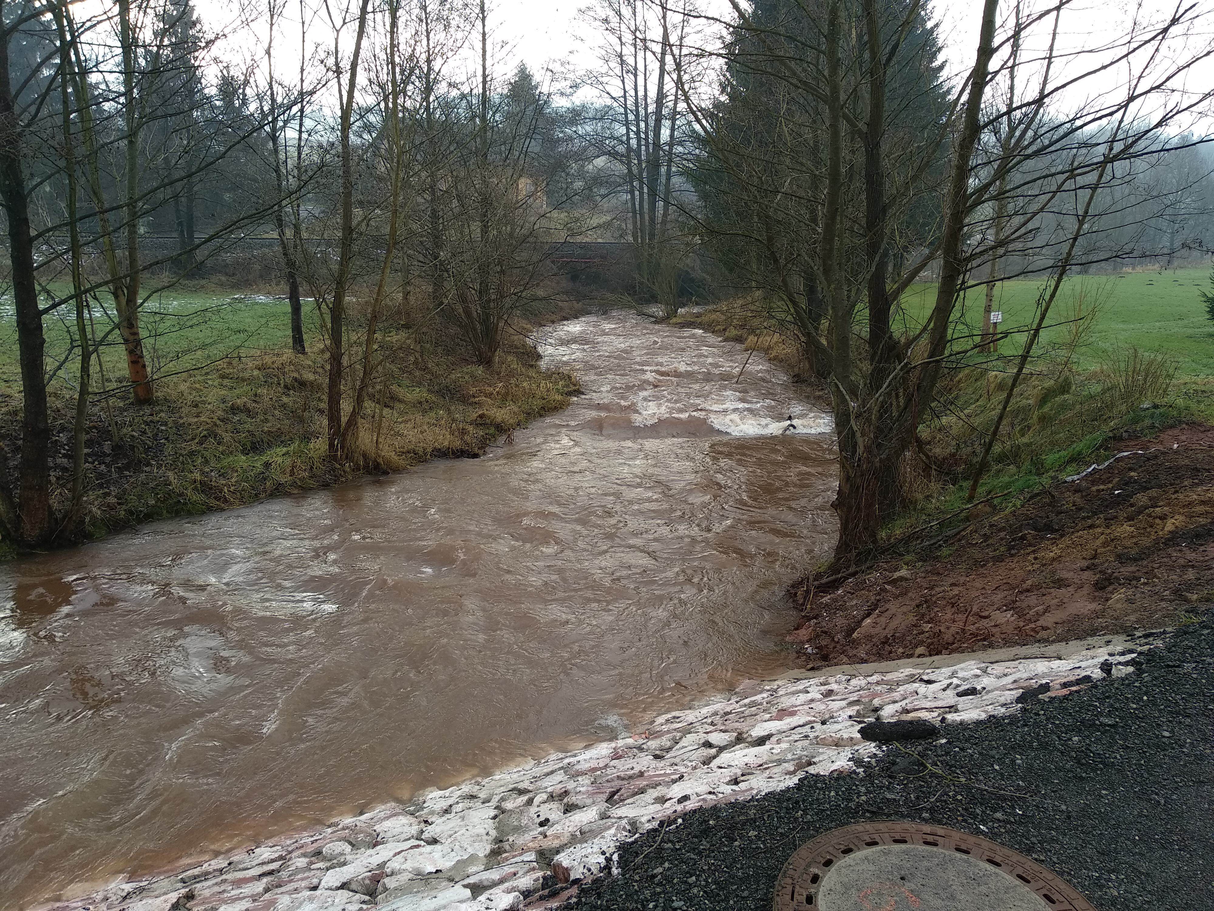 Pilníkovský potok v Chotěvicích